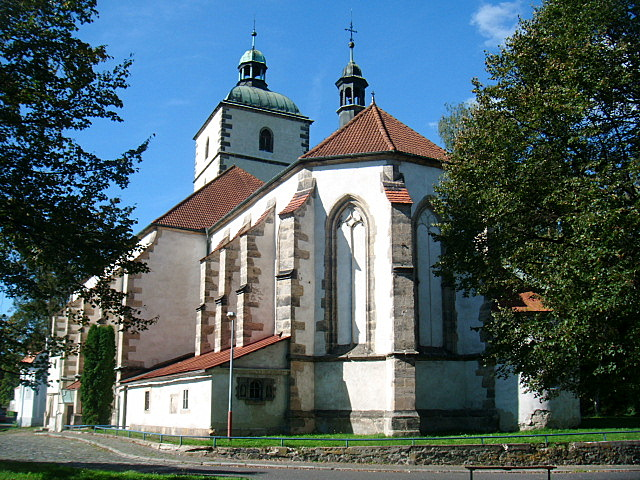 Kostel Narození P. Marie (Benešov nad Ploučnicí), Benešov nad Ploučnicí